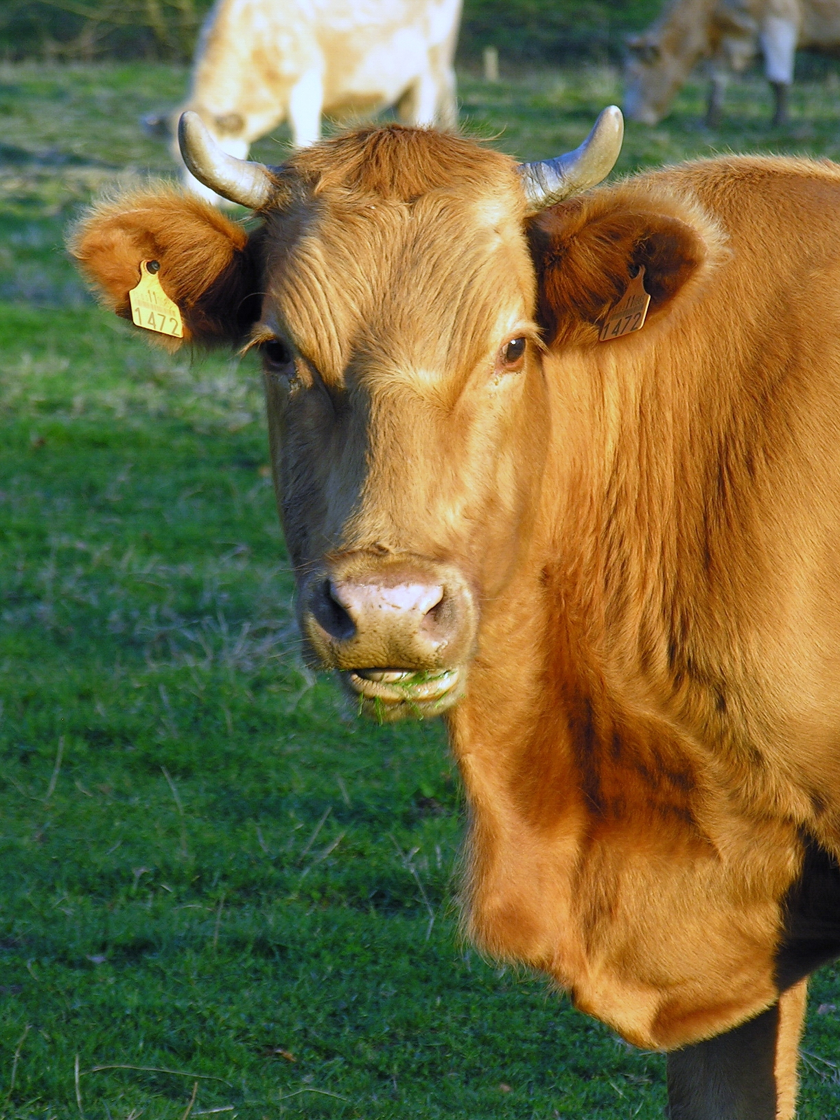 A Castañeda, Concello de Arzúa, Galiza